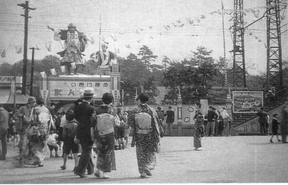 多摩川園（たまがわえん、Tamagawa-en）は、かつて東京都大田区田園調布にあった遊園地である